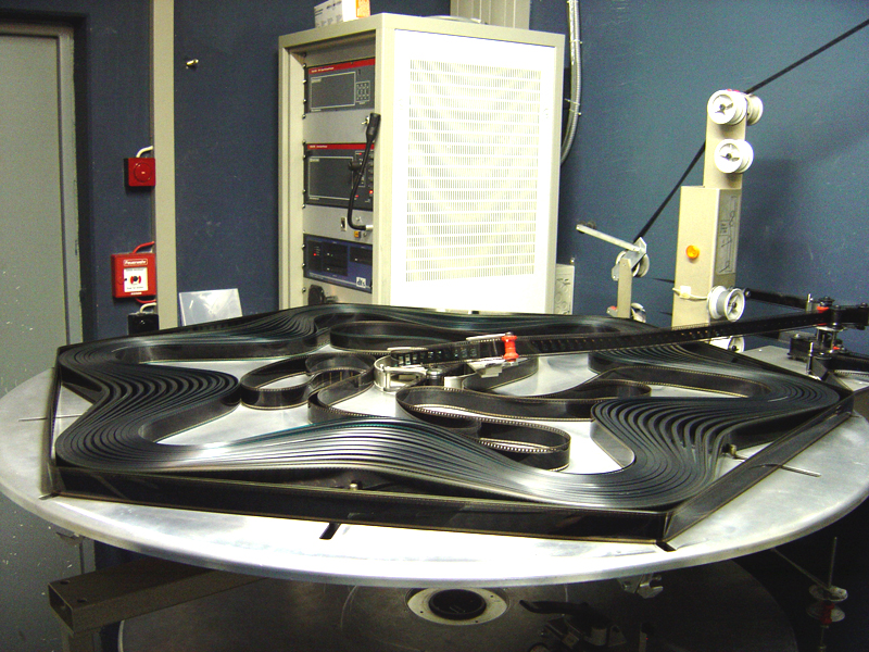 Endlostelleranlage der Firma Kinoton